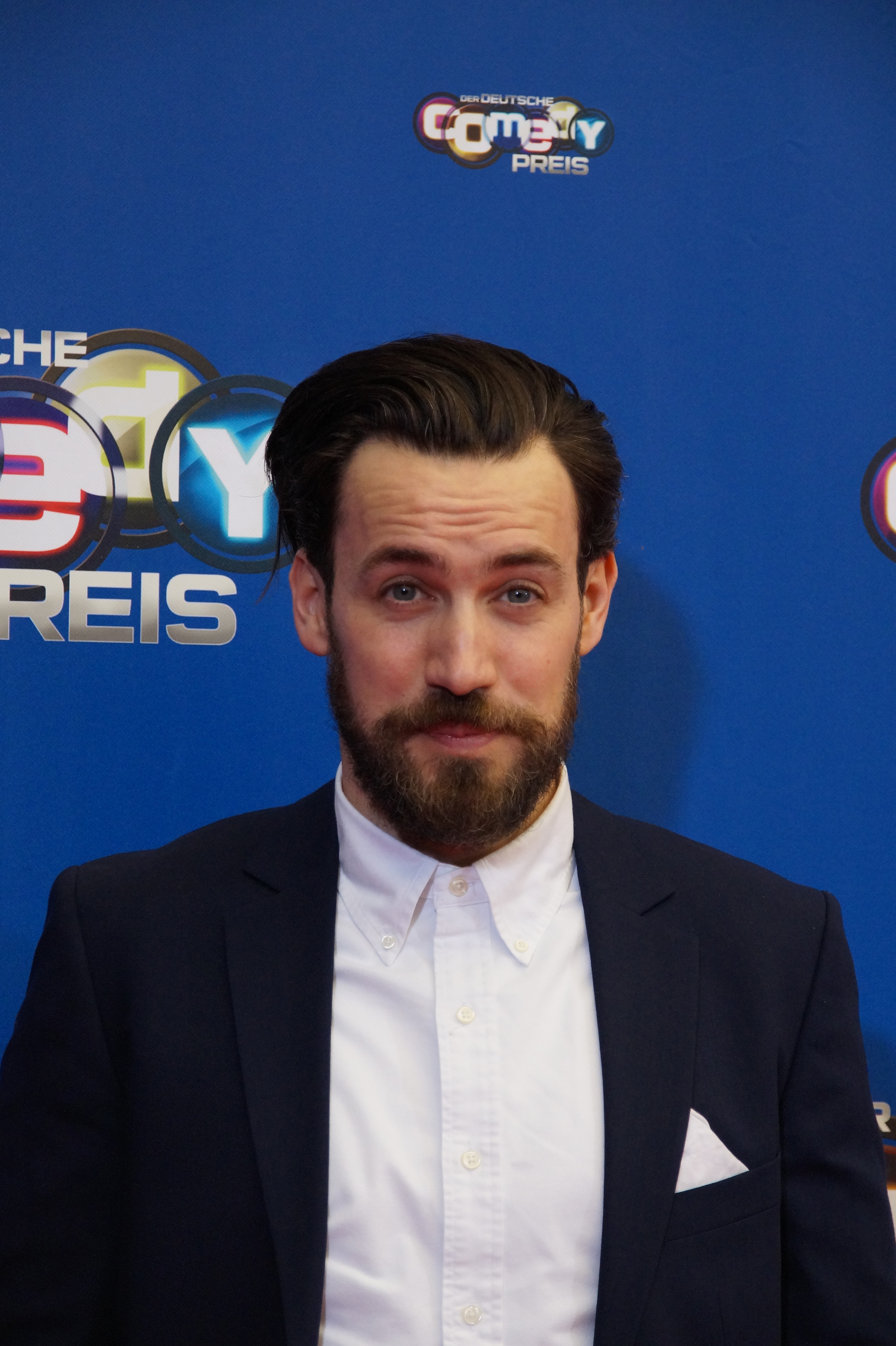 Jan Köppen beim Comedypreis 2016, im Oktober, Köln.